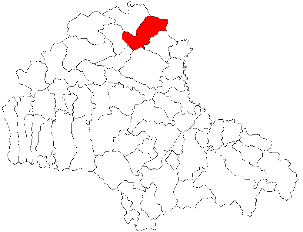 Categorie:Hărţi ale judeţului Braşov